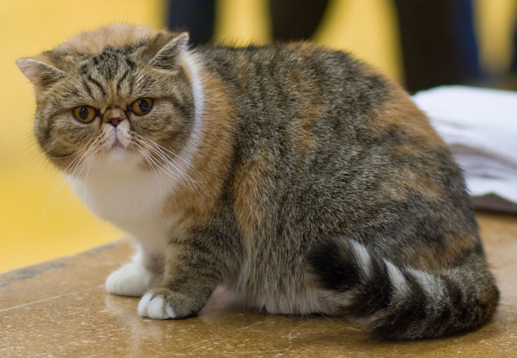 Noidankattilan Bellatrix, exotic shorthair femelle présentée en exposition féline à Helsinki en 2008. Code EMS Noidankattilan Bellatrix [EXO f 03 24] female EX1 CACE